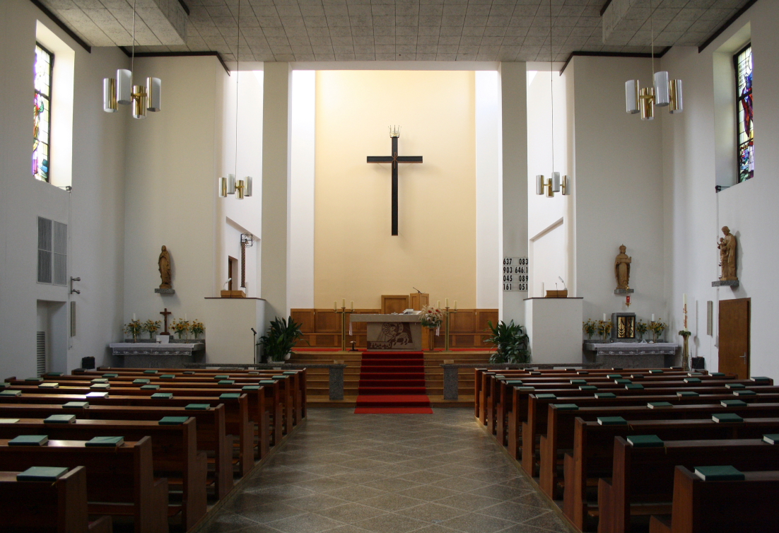 Die Innenansicht Richtung Altar der Leopoldskirche in Klosterneuburg.